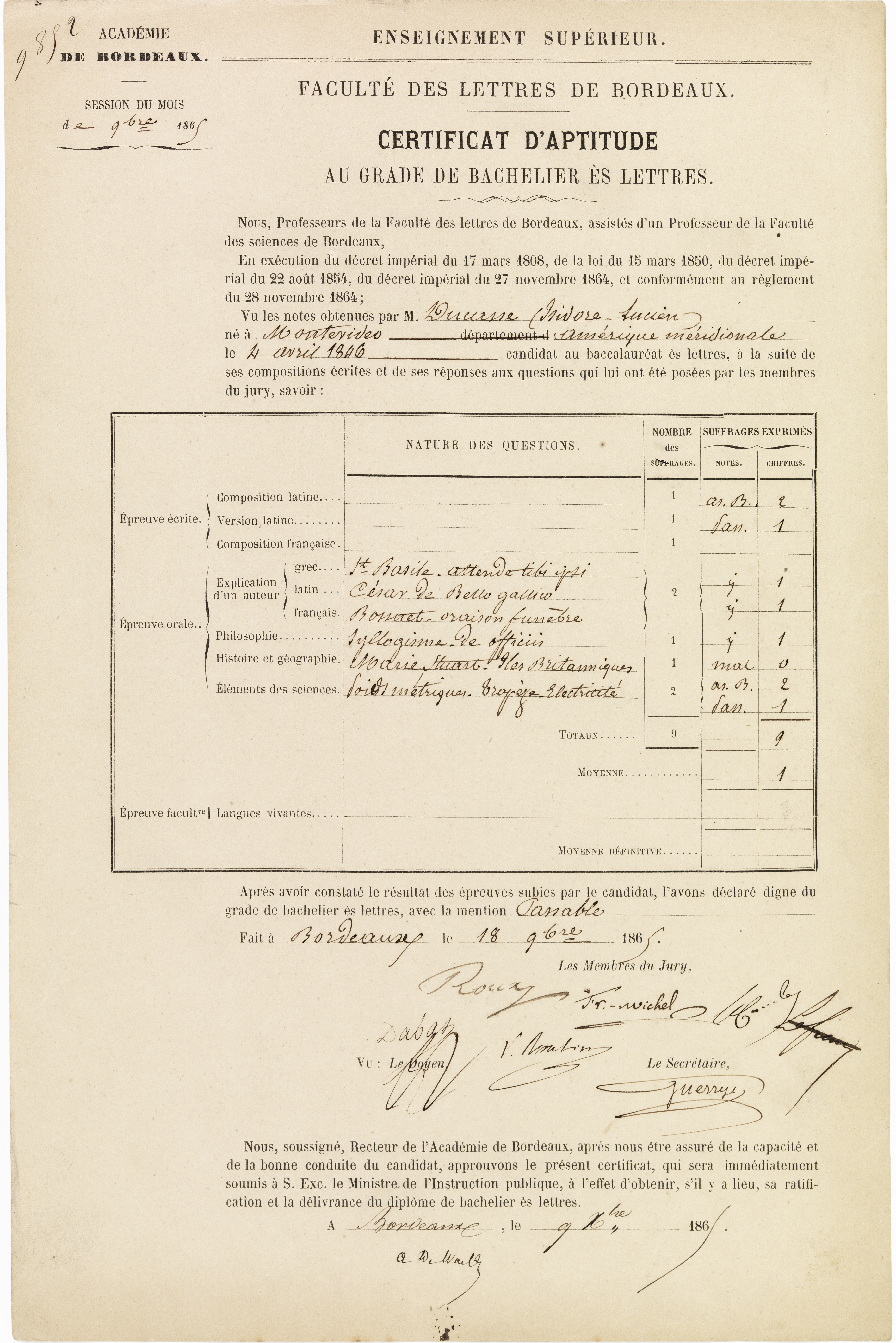 Bachillerato de Isidore Ducasse, Burdeos, 1865 (Archivo nacional de Francia)